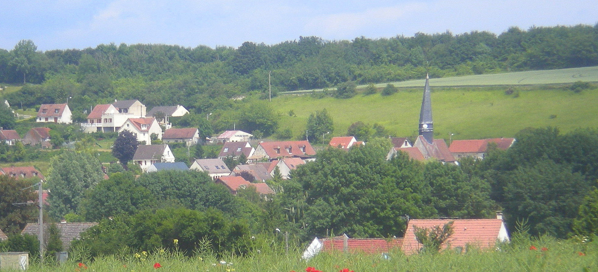 Vue générale du village d'Airion (60) depuis la rue d'Étouy.